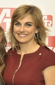 Cibercorresponsales, premio ATR 2013